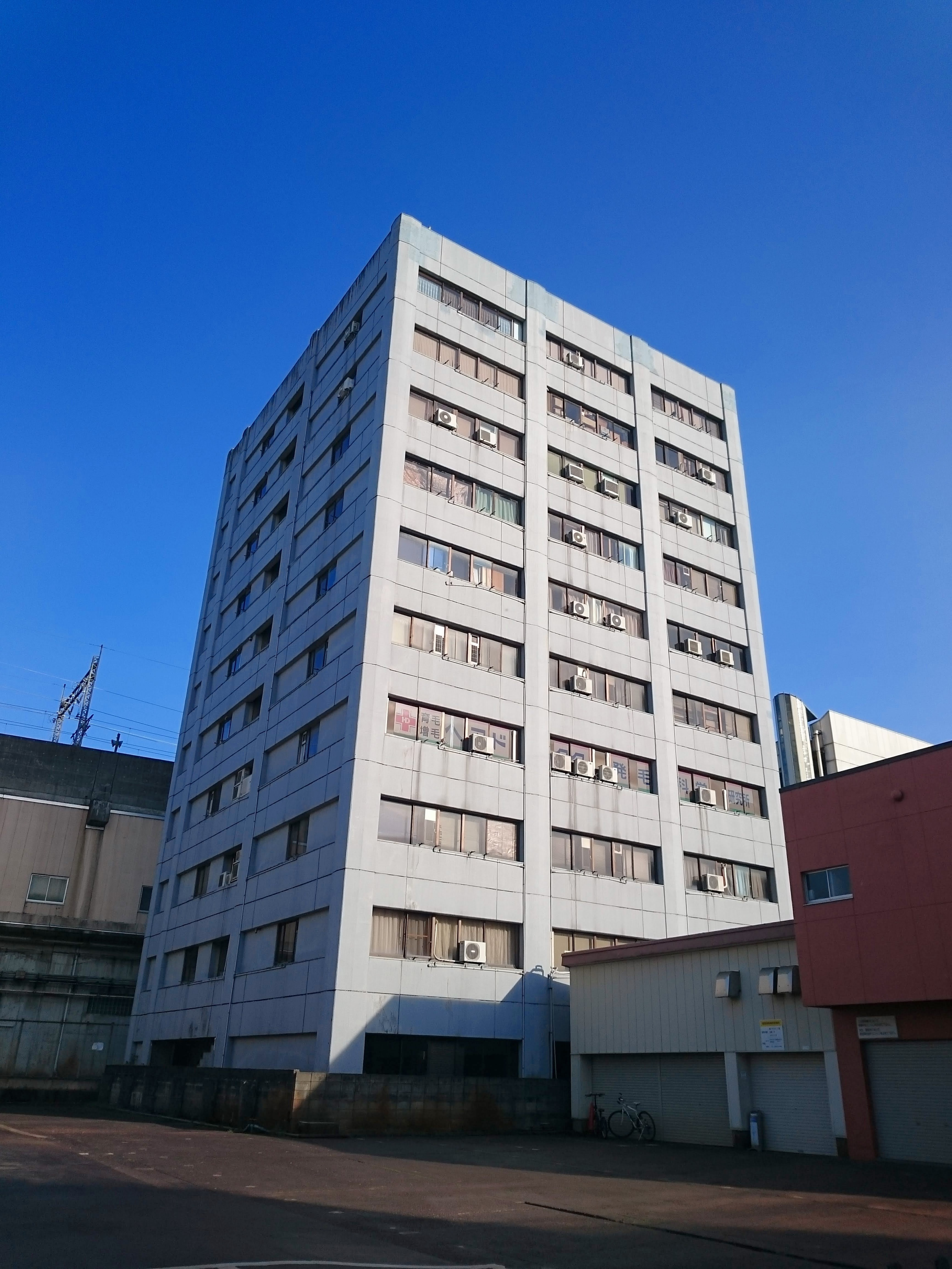 ヘアドクター株式会社などが入居するアオシビル（長岡市）の外観